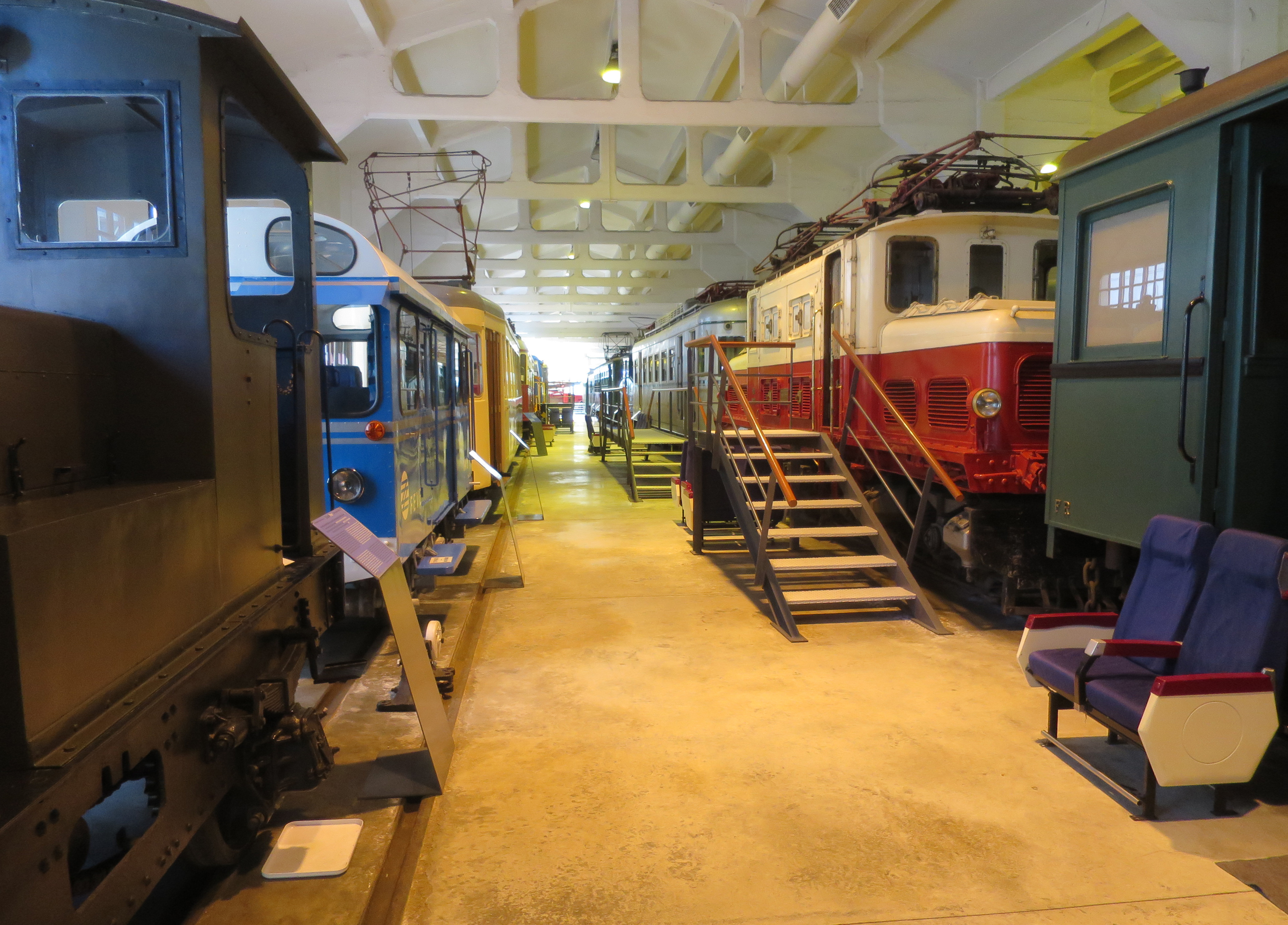 Fahrzeughalle im Baskischen Eisenbahnmuseum, Azpeitia